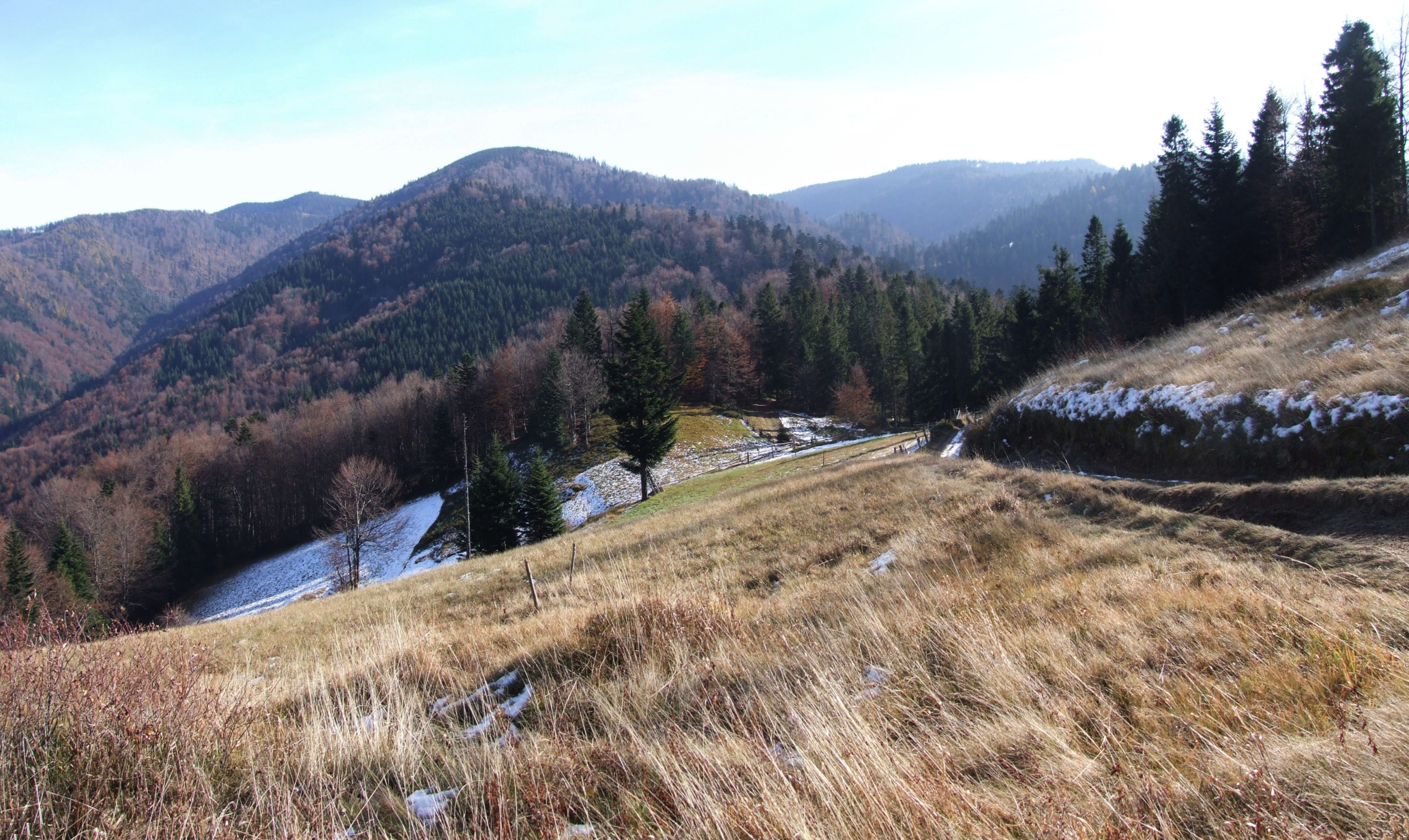 Herślowa Polana w Paśmie Radziejowej (miejscowość Obidza). U góry Jasiennik, dolina Majdańskiego Potoku,Skałka. Po prawej stronie Skałki dolina Sopotnickiego Potoku